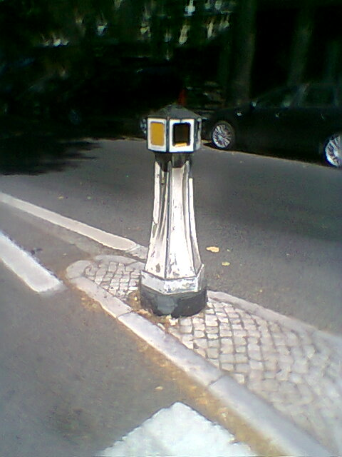 “pimenteira”